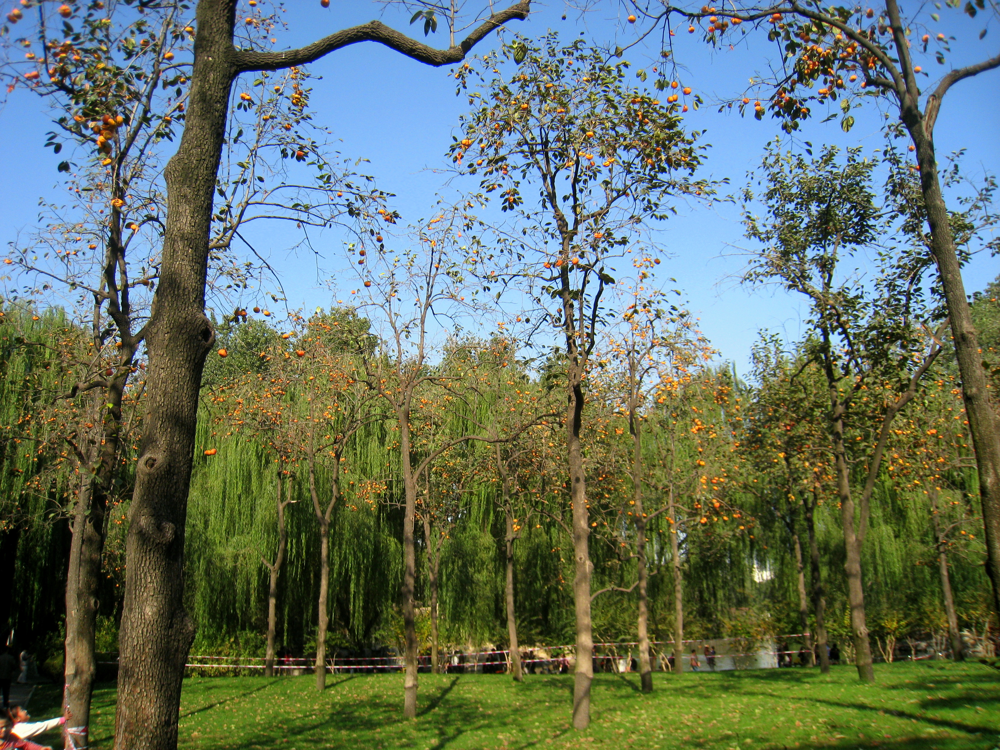 Beijing Zoo (北京动物园), Beijing, China.